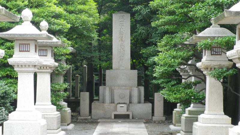 大隈重信の墓